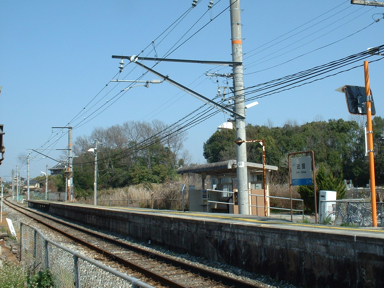 近田駅、2006年3月25日に投稿者が撮影